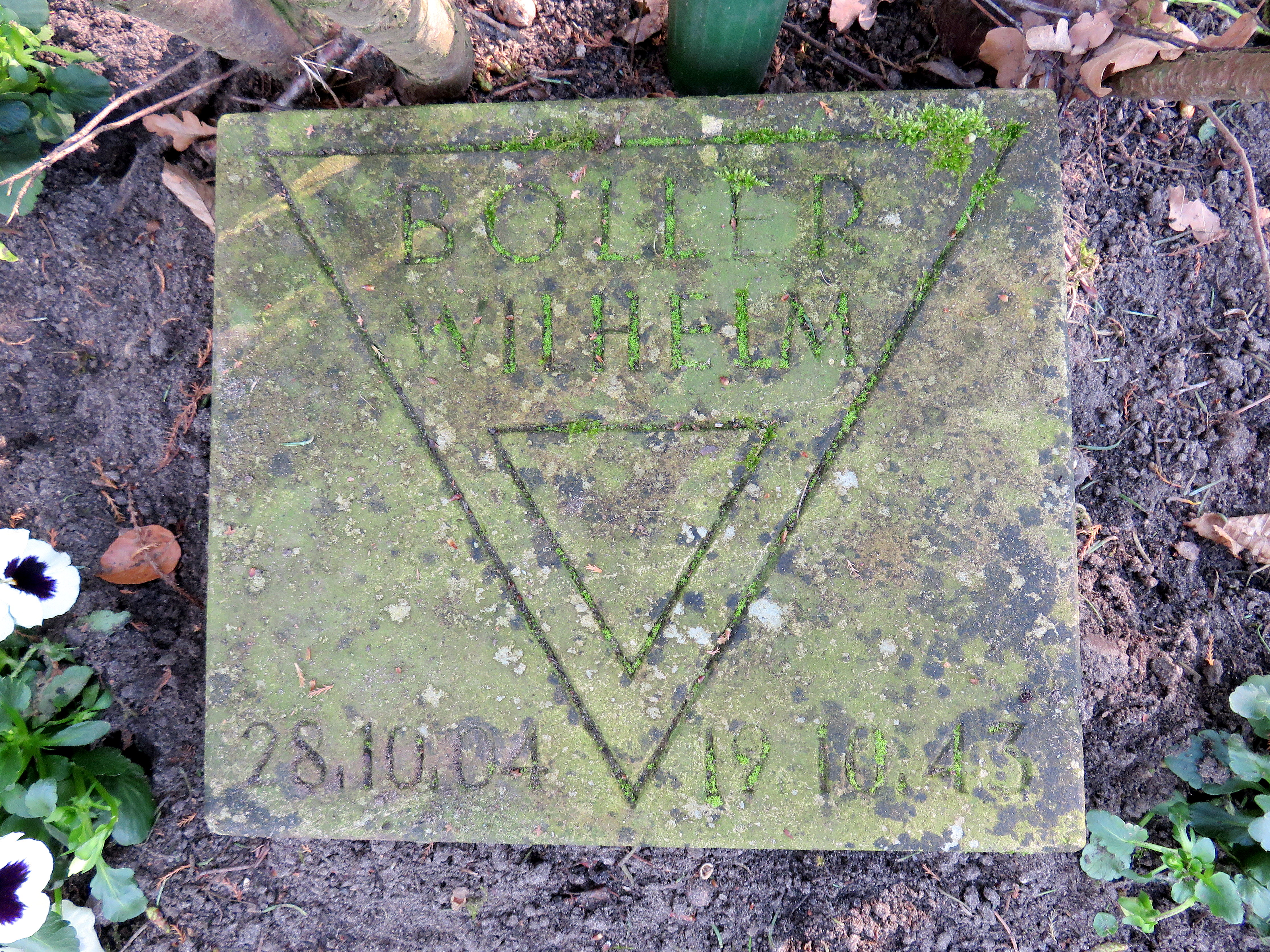 Kissenstein für den deutschen Widerstandskämpfer Wilhelm Boller im Ehrenhain Hamburgischer Widerstandskämpfer, Friedhof Ohlsdorf, Planquadrat K 5 (Bergstraße gegenüber dem Museum).